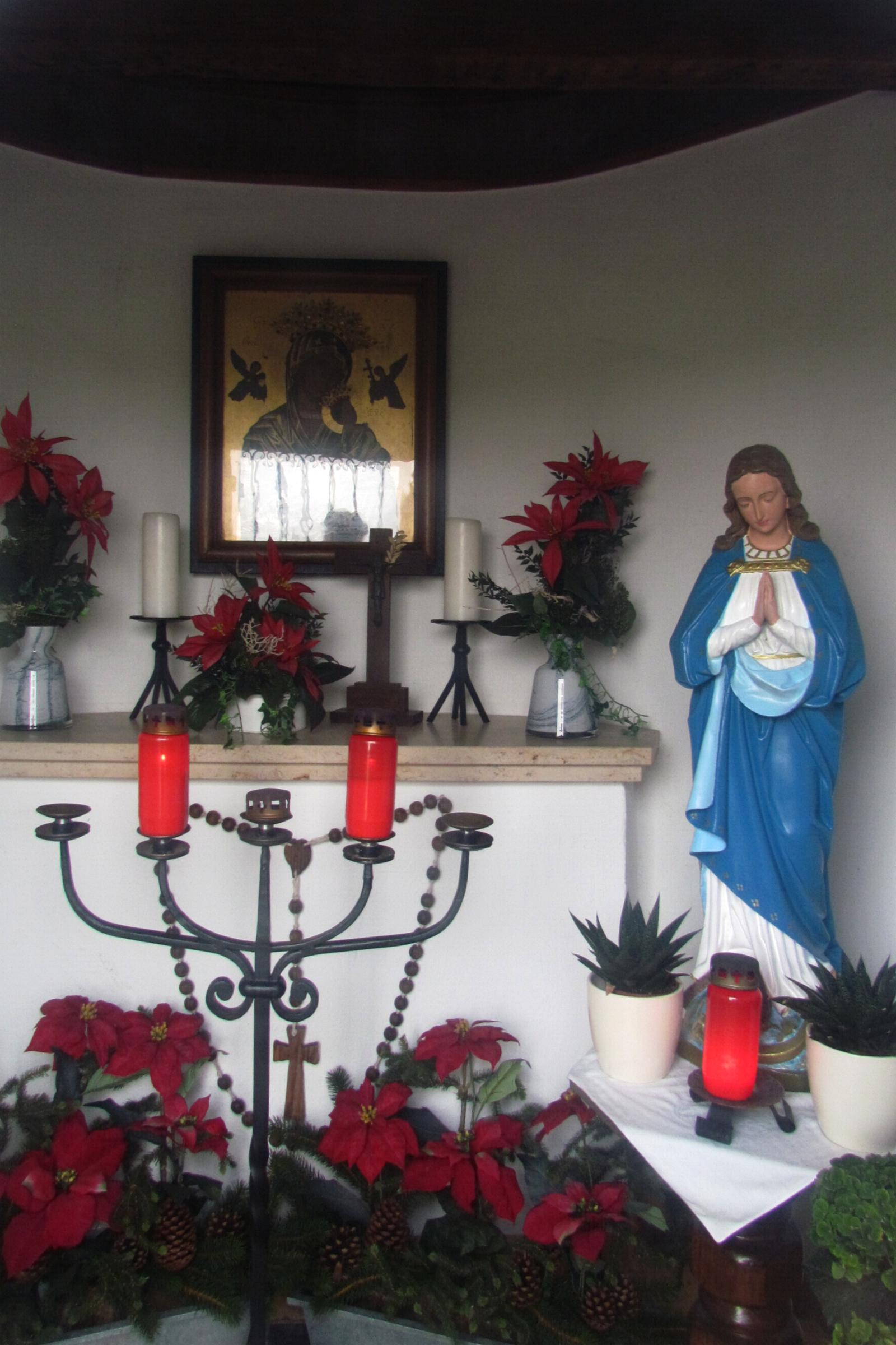 Kirchen, Kapellen in Heinsberg